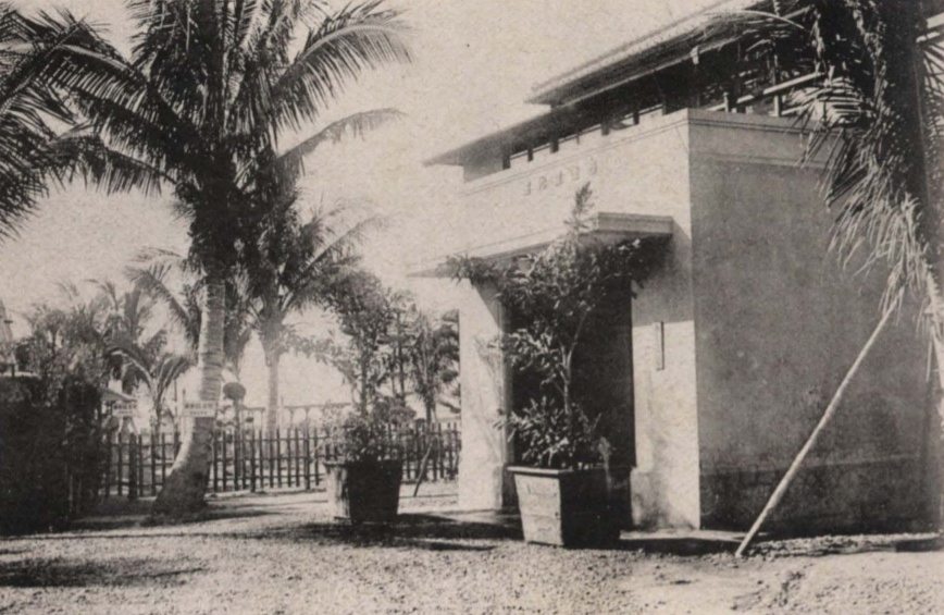 中文（台灣）: 現為高雄西子灣蔣公行館